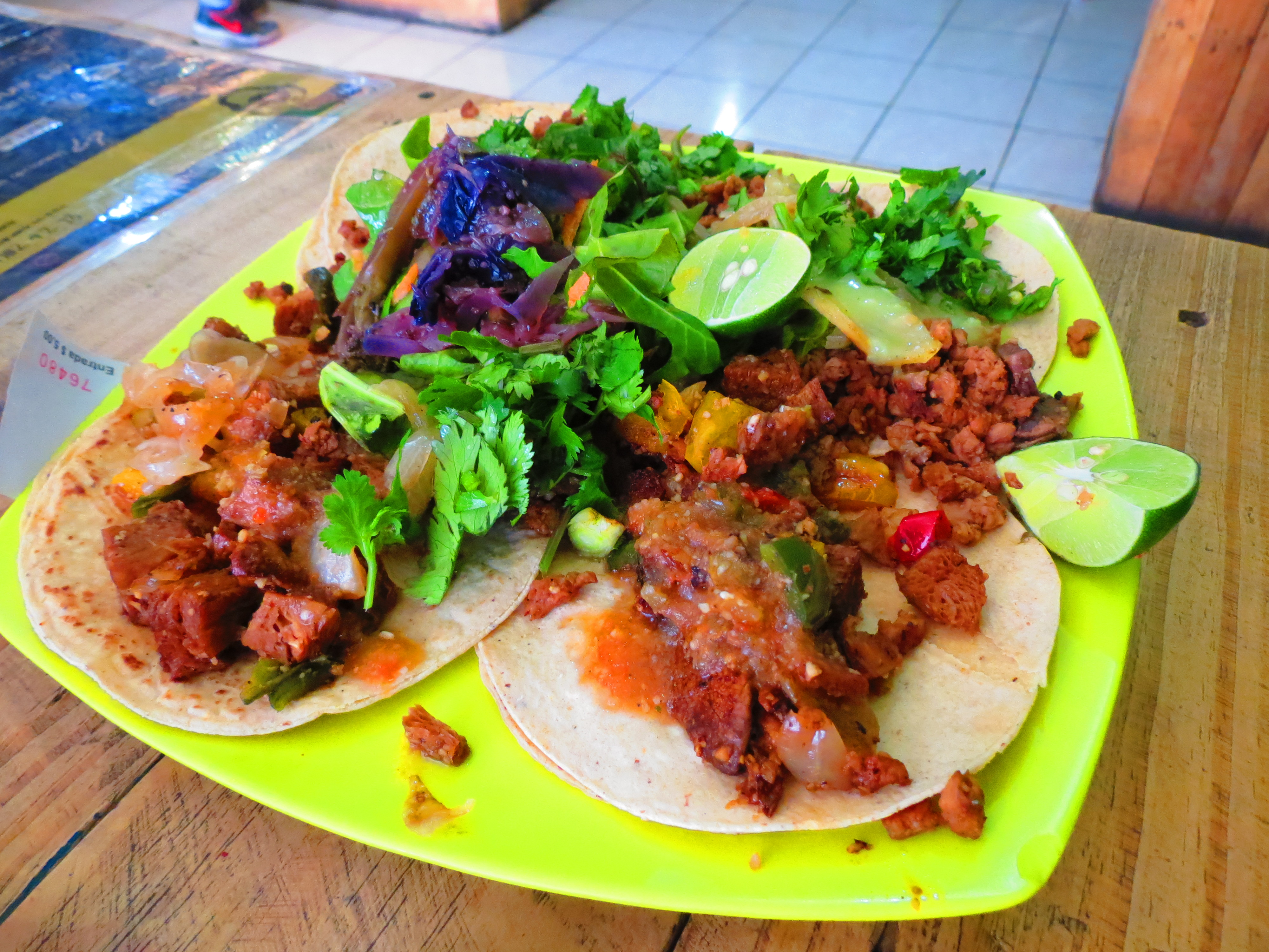 Tacos veganos de Avocado Punk (Taquería vegana), en Aguascalientes